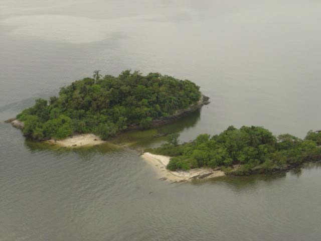 Iha das Bananas